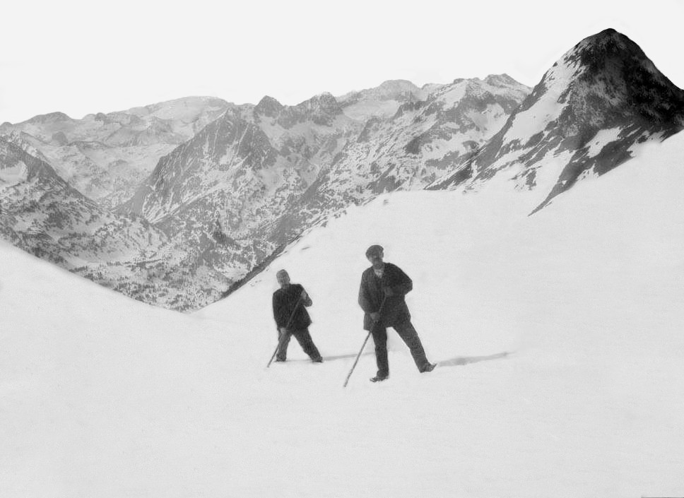 Imatge